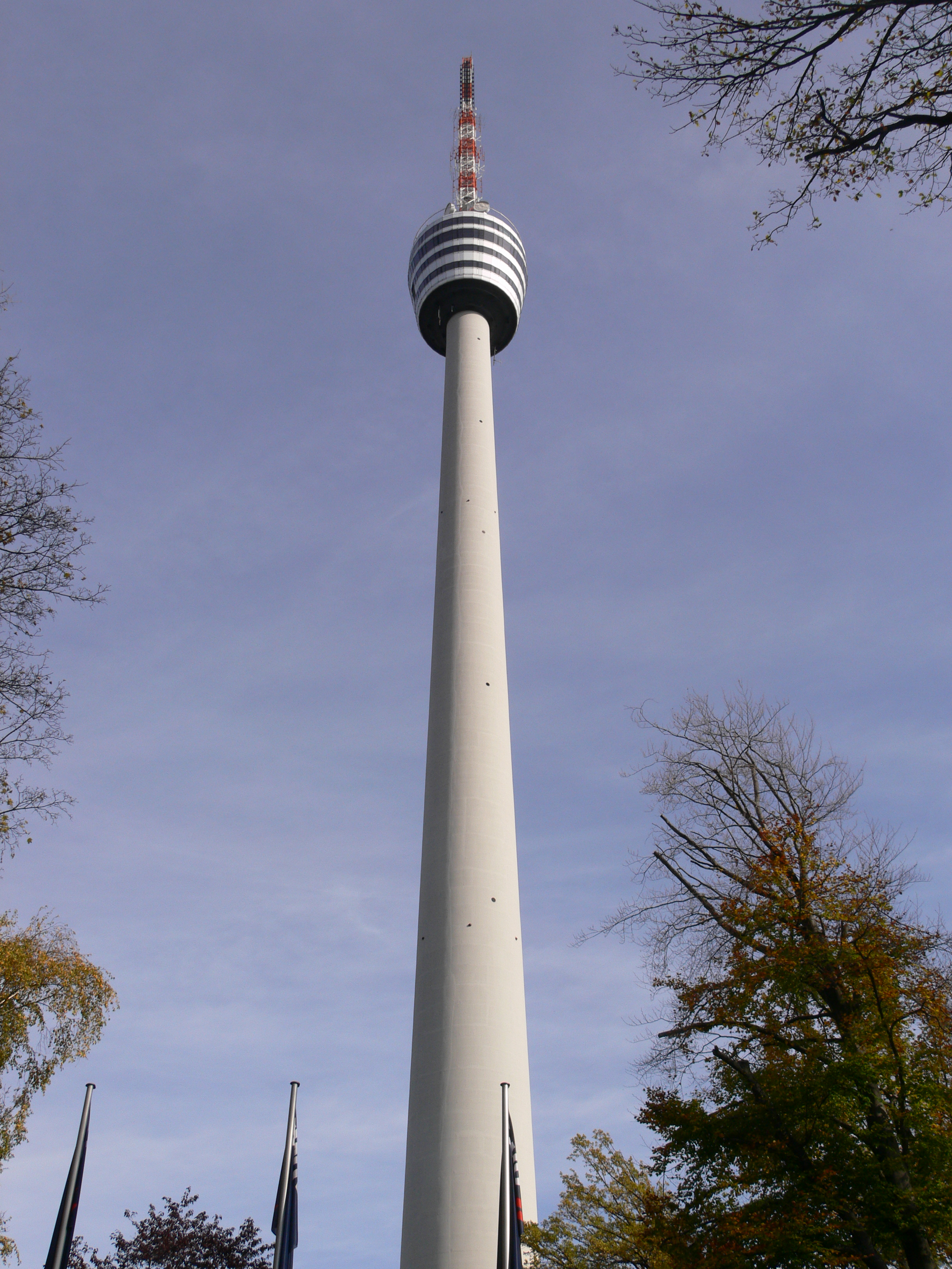 Fernsehturm Stuttgart